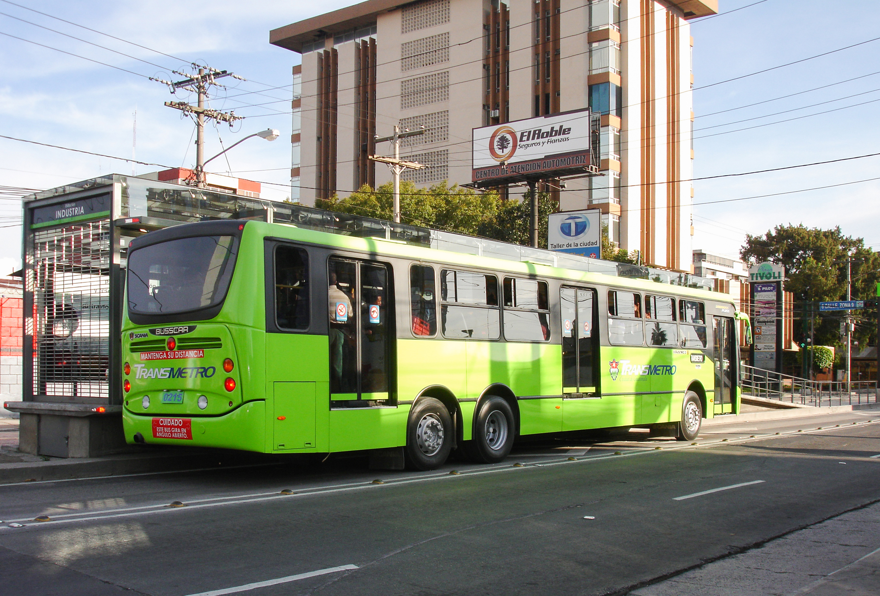 Parada de Transmetro, zona 9